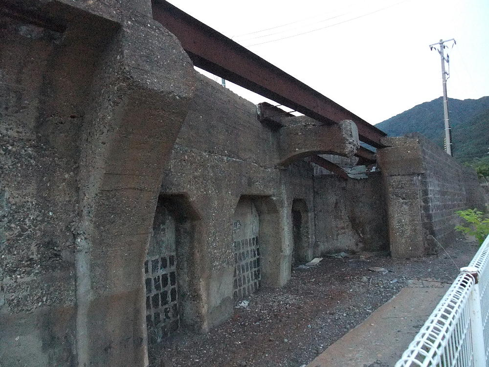 発盛鉱山跡